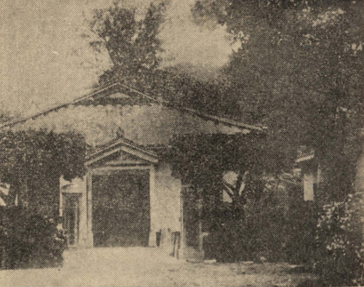 新竹州苗栗郡通霄庄役場